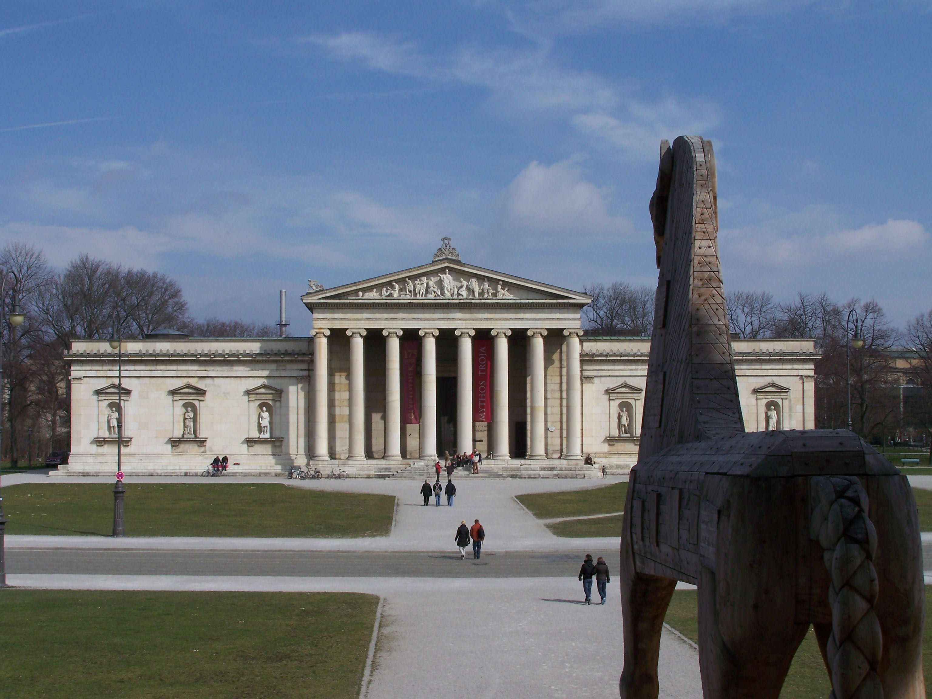 Glyptothek in München